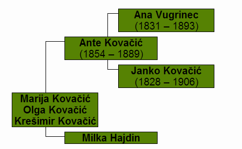 Obiteljsko stablo Ante Kovačića, hrvatskog književnika.